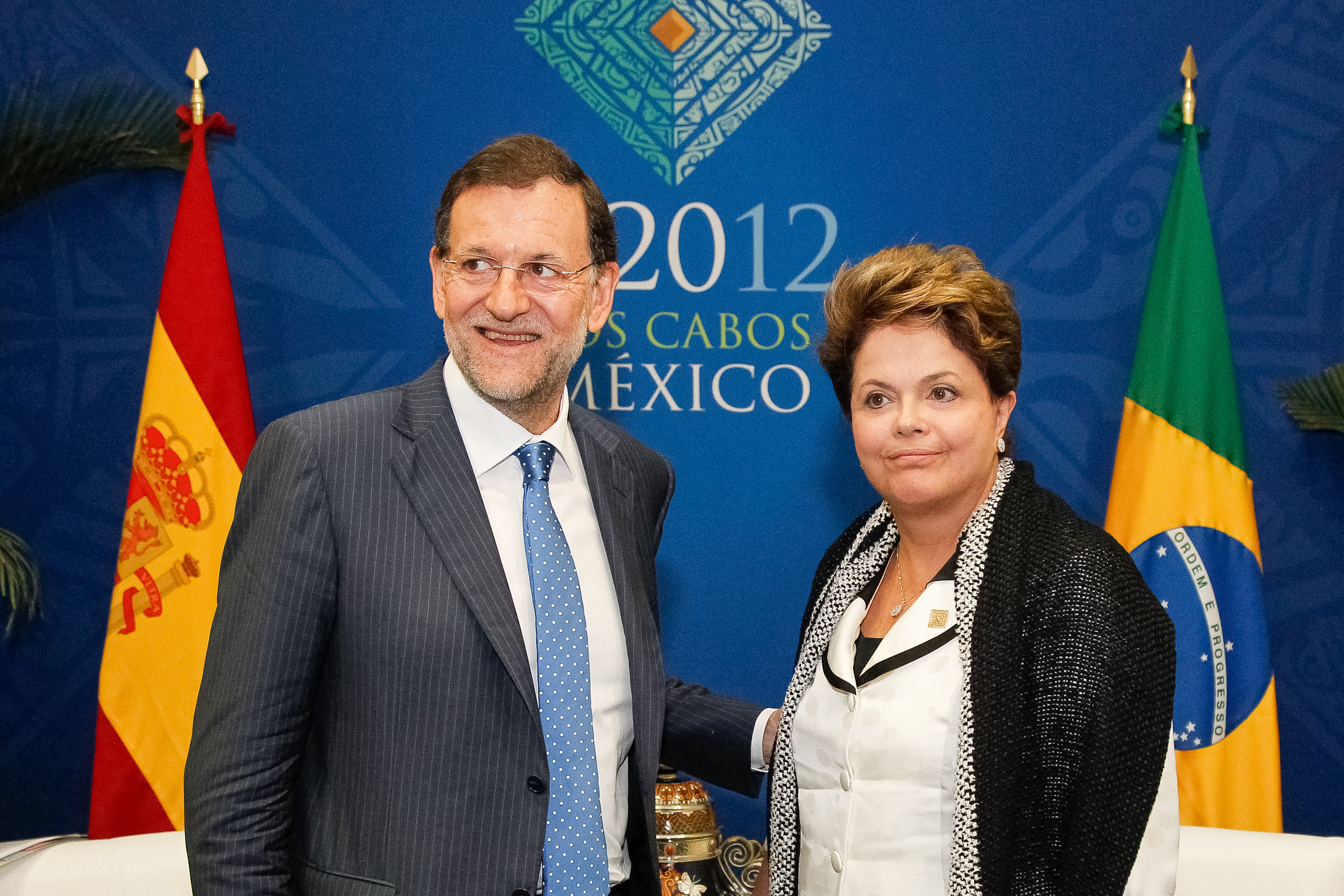 Presidenta Dilma Rousseff durante encontro com primeiro-ministro espanhol, Mariano Rajoy. Los Cabos - México, 19/06/2012 Foto: Roberto Stuckert Filho/PR